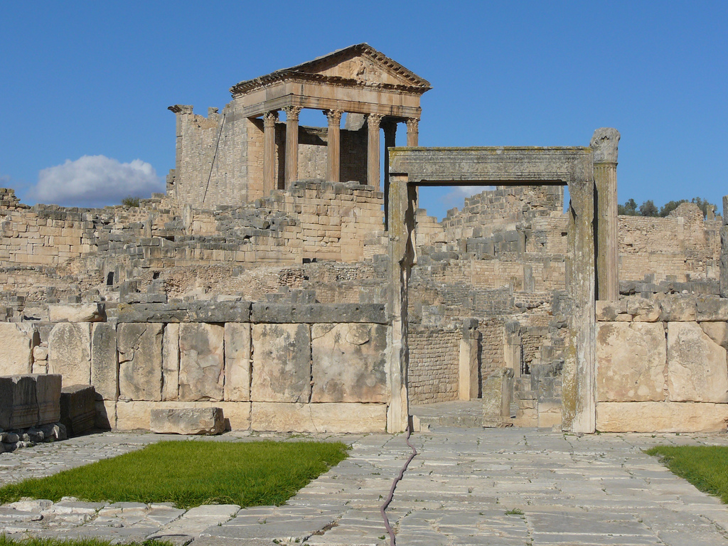 Porte du Dar Lacheb et vue du Capitole de Dougga à l'arrière-plan